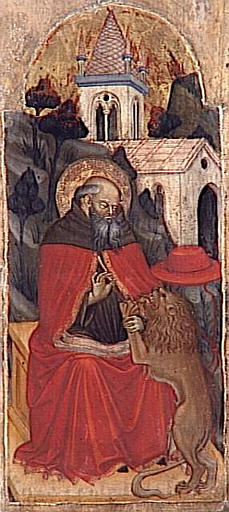 Saint Jerome Guerissant Le Lion